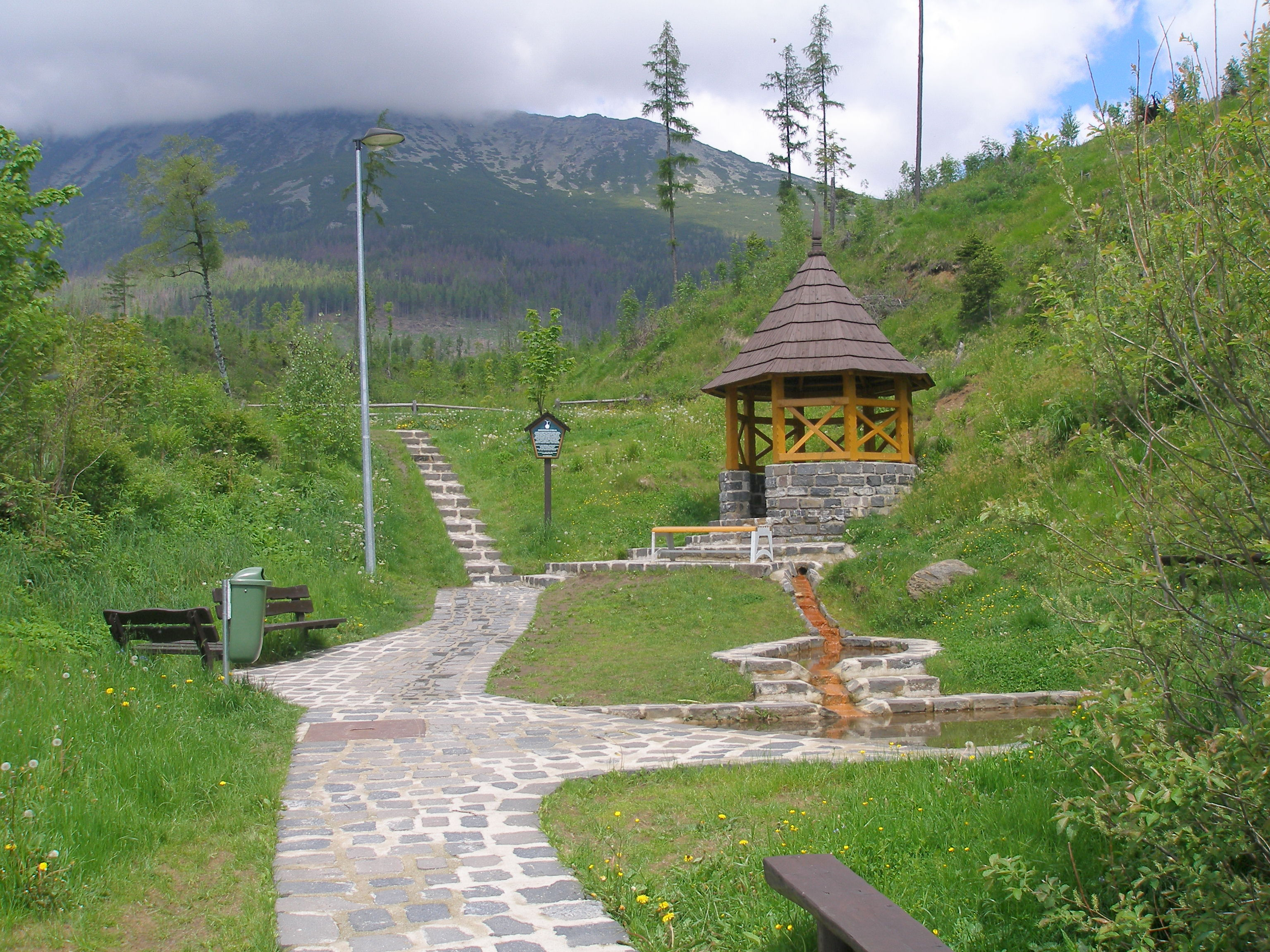 Mesto Vysoké Tatry, časť Starý Smokovec, okres Poprad, región Spiš.